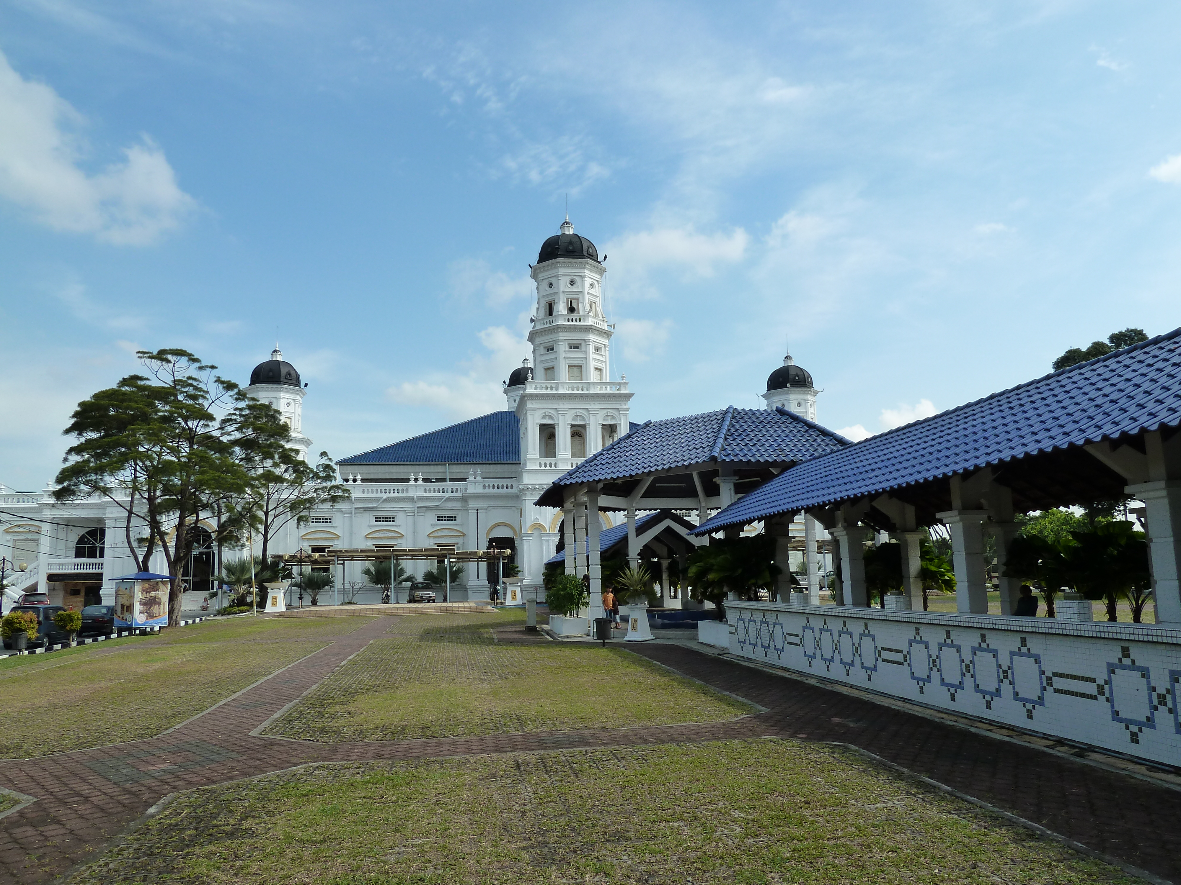 アブ・バカール・モスク （ブルーモスク）